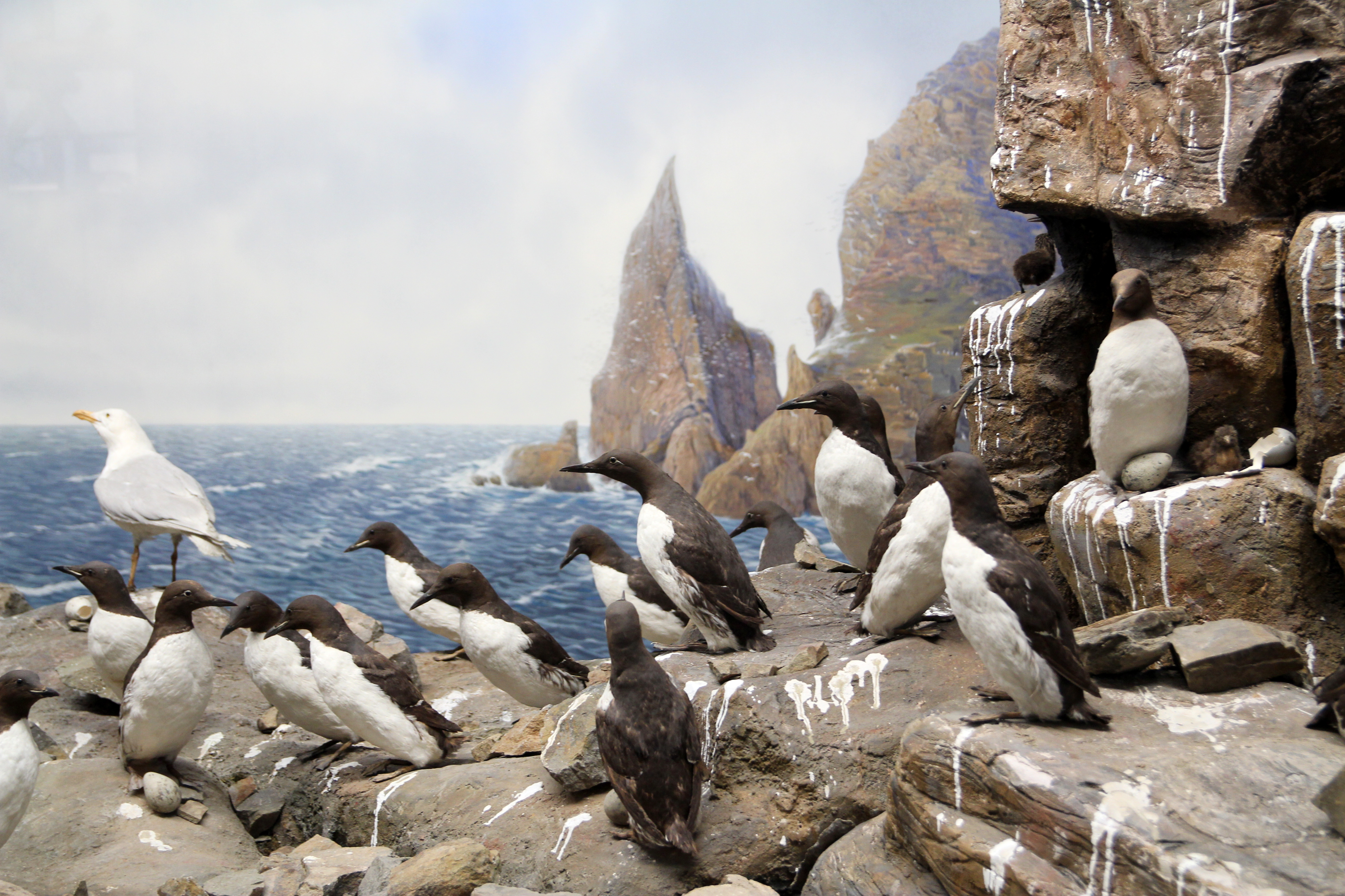 Museum Koenig. Diorama mit Seevögeln.